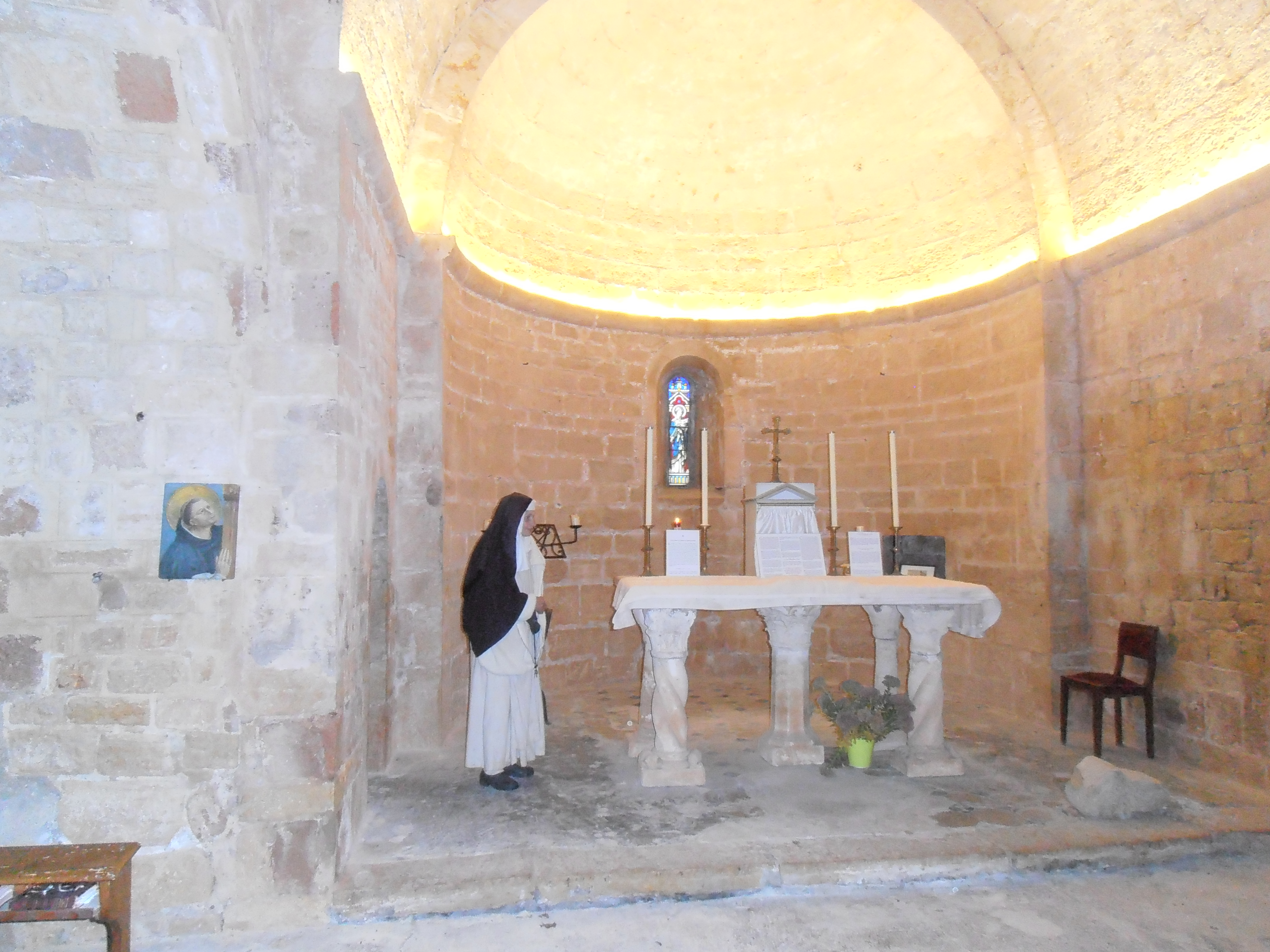 Var, Ampus, Chapelle-Notre-Dame de Spéluque, Intérieur avec la soeur dominicaine, Soeur Jeanne-Marie du Saint-Esprit